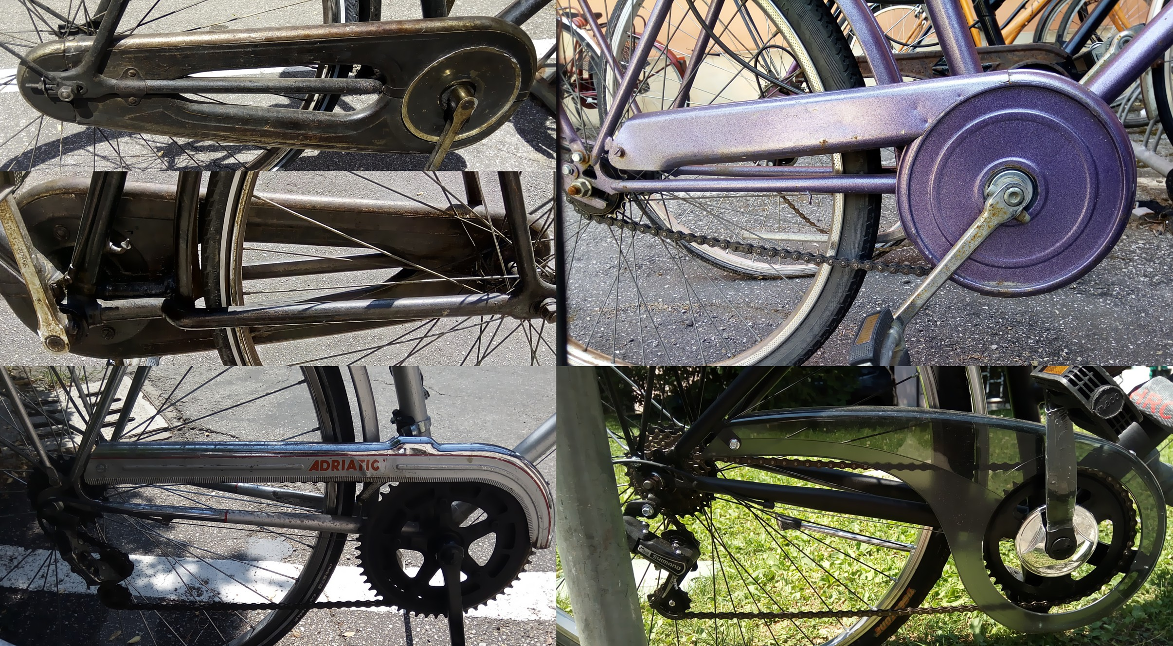 Esempi differenti di carter bicicletta, dal più chiuso al più aperto